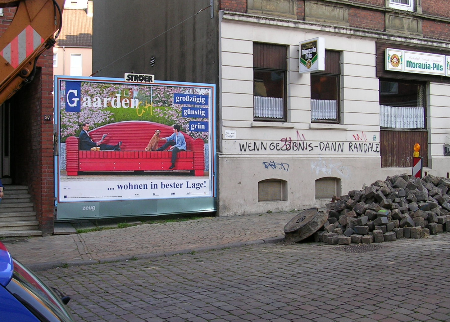 Selbst erstelltes Foto - svenne